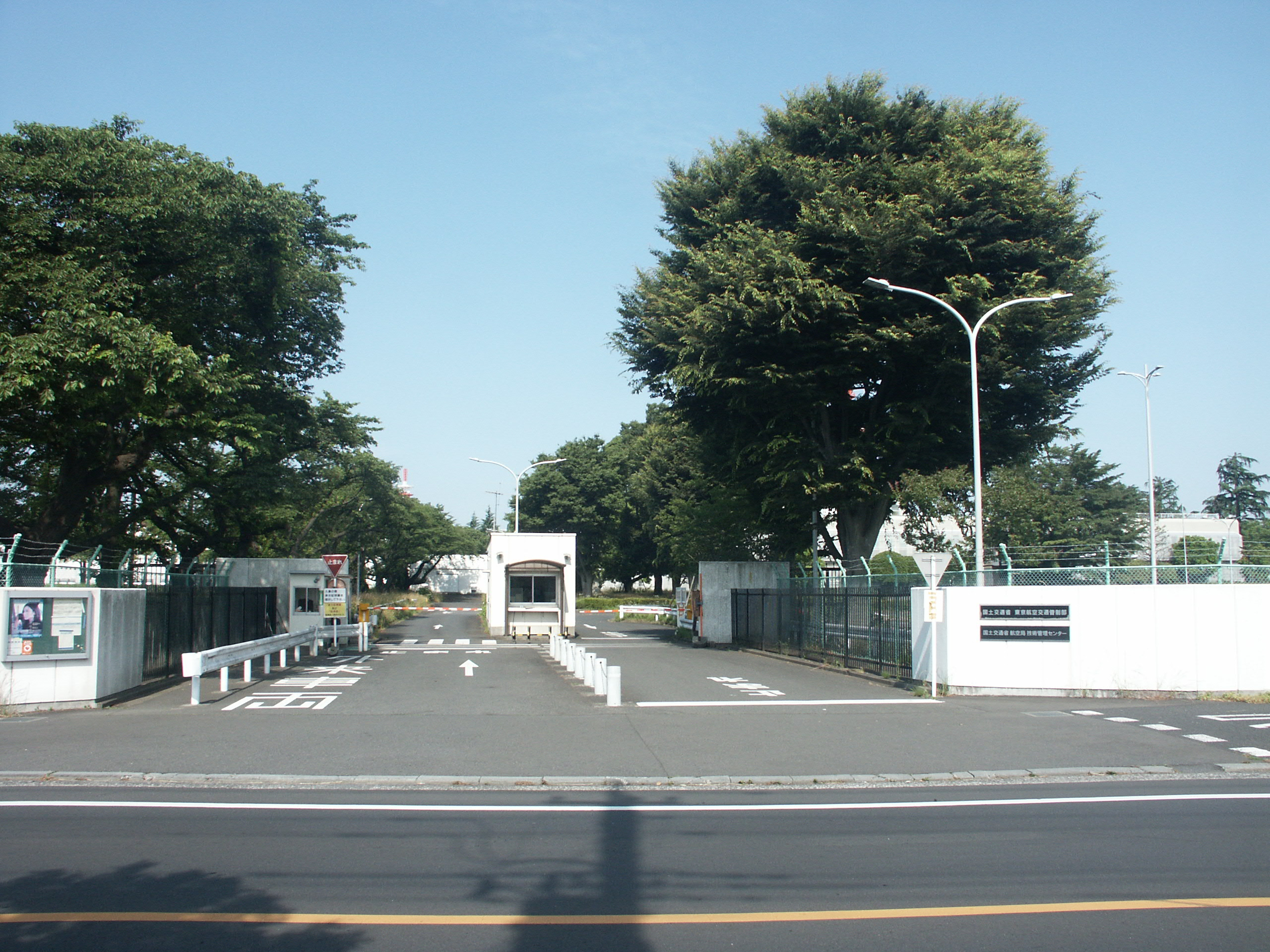 東京航空交通管制部（入退場ゲート付近）